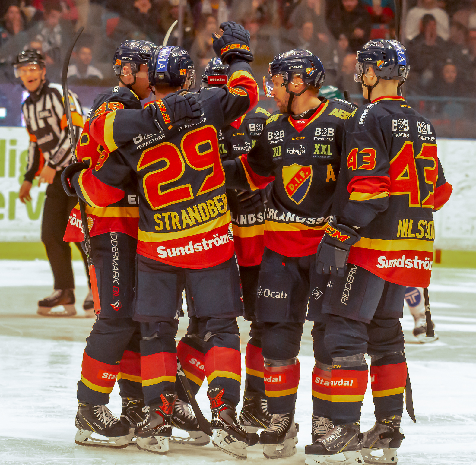 Djurgården-Färjestad 20190129